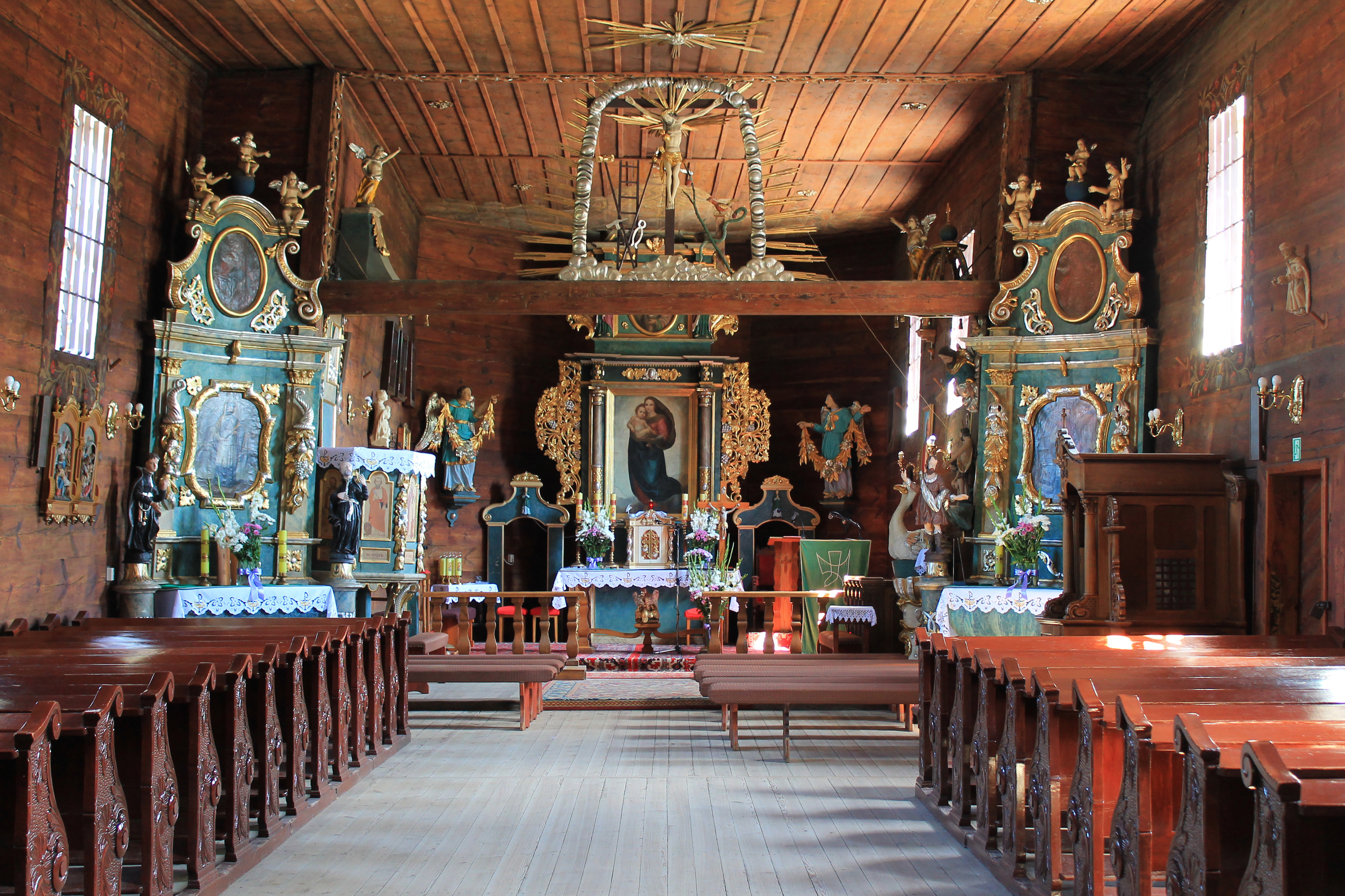 Kościół katolicki św. Mikołaja i św. Jadwigi w Dębnicy - wnętrze